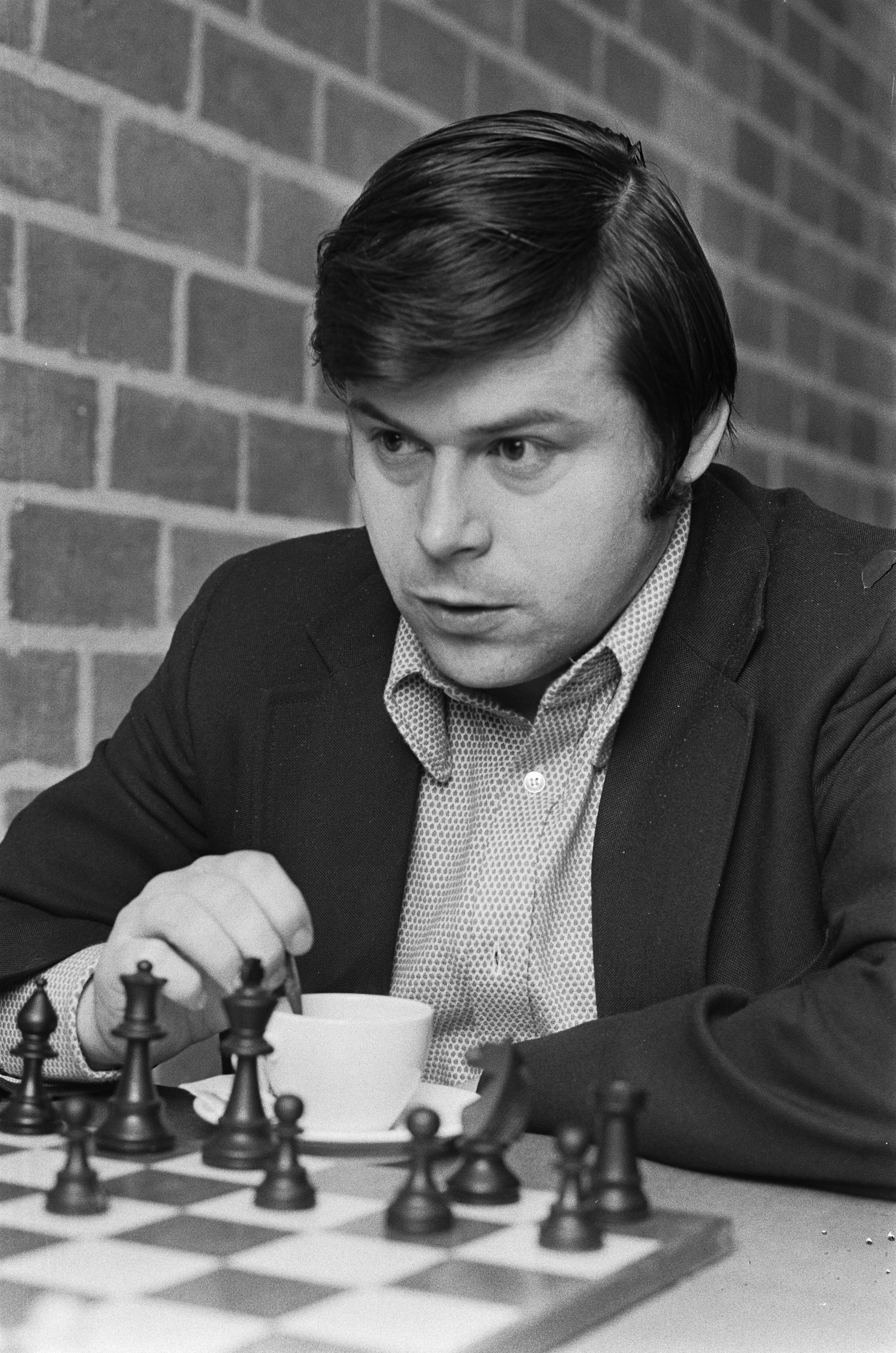 Collectie / Archief : Fotocollectie Anefo Reportage / Serie : [ onbekend ] Beschrijving : Hoogoven-schaaktoernooi te Wijk aan Zee , de Tsjech Hort Datum : 23 januari 1973 Locatie : Noord-Holland, Wijk aan Zee Trefwoorden : schaken Instellingsnaam : Hoogovenschaaktoernooi Fotograaf : Verhoeff, Bert / Anefo Auteursrechthebbende : Nationaal Archief Materiaalsoort : Negatief (zwart/wit) Nummer archiefinventaris : bekijk toegang 2.24.01.05 Bestanddeelnummer : 926-1746